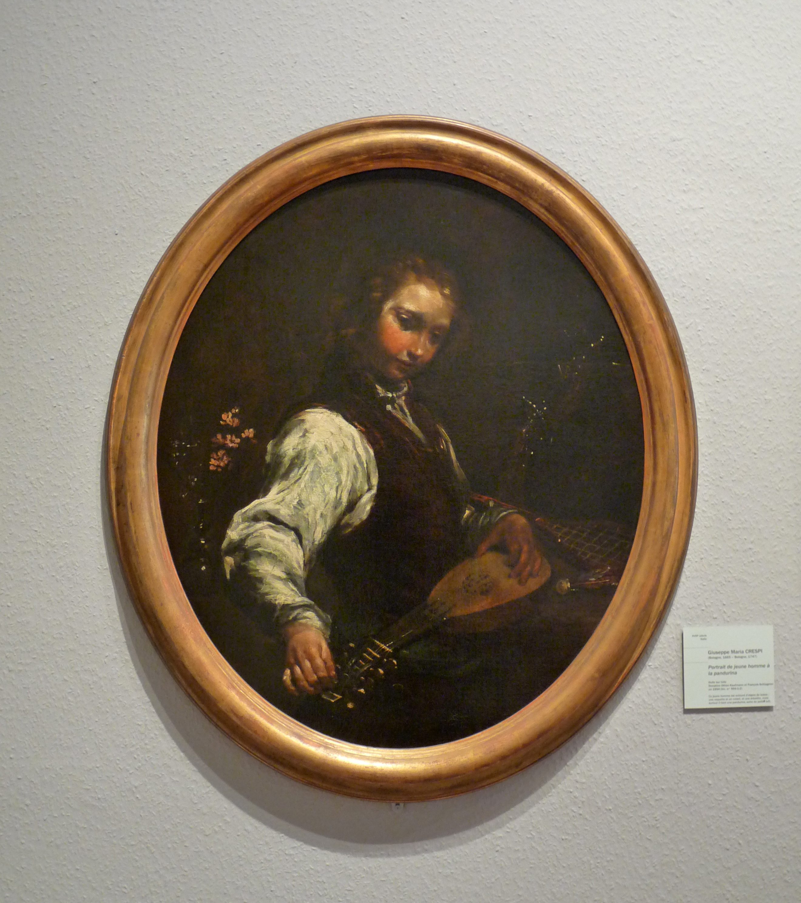 Portrait de jeune homme à la pandurina, huile sur toile de Giuseppe Maria Crespi au Musée des Beaux-Arts de Strasbourg